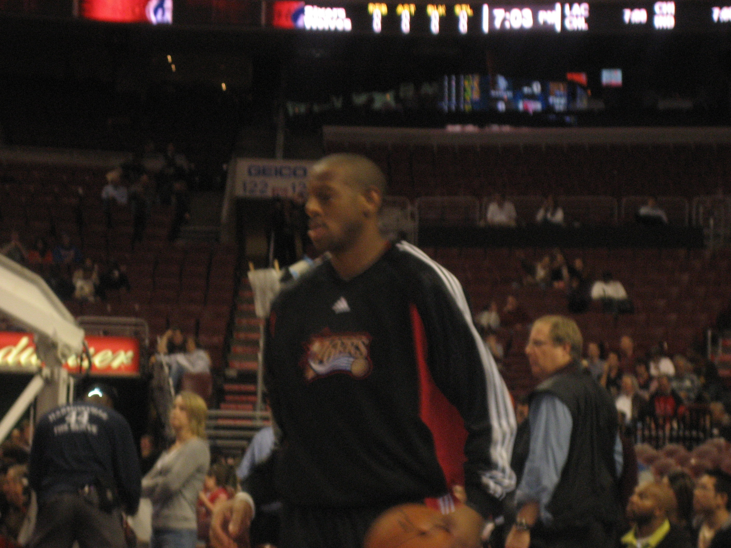 Andre Iguodala